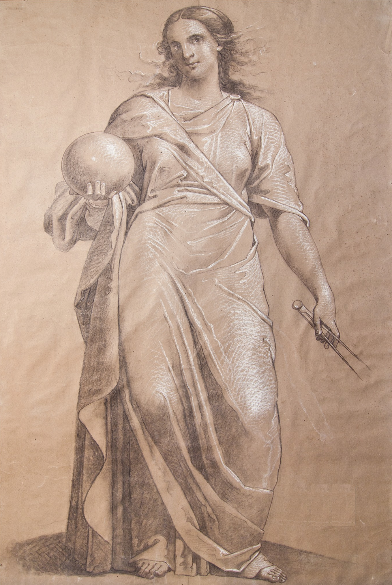 Alegorie reprezentând ,,Știința", desen de mari dimensiuni, 180x110 cm, executat în cărbune și cretă pe hârtie. - Muzeul Gheorghe Tattarescu